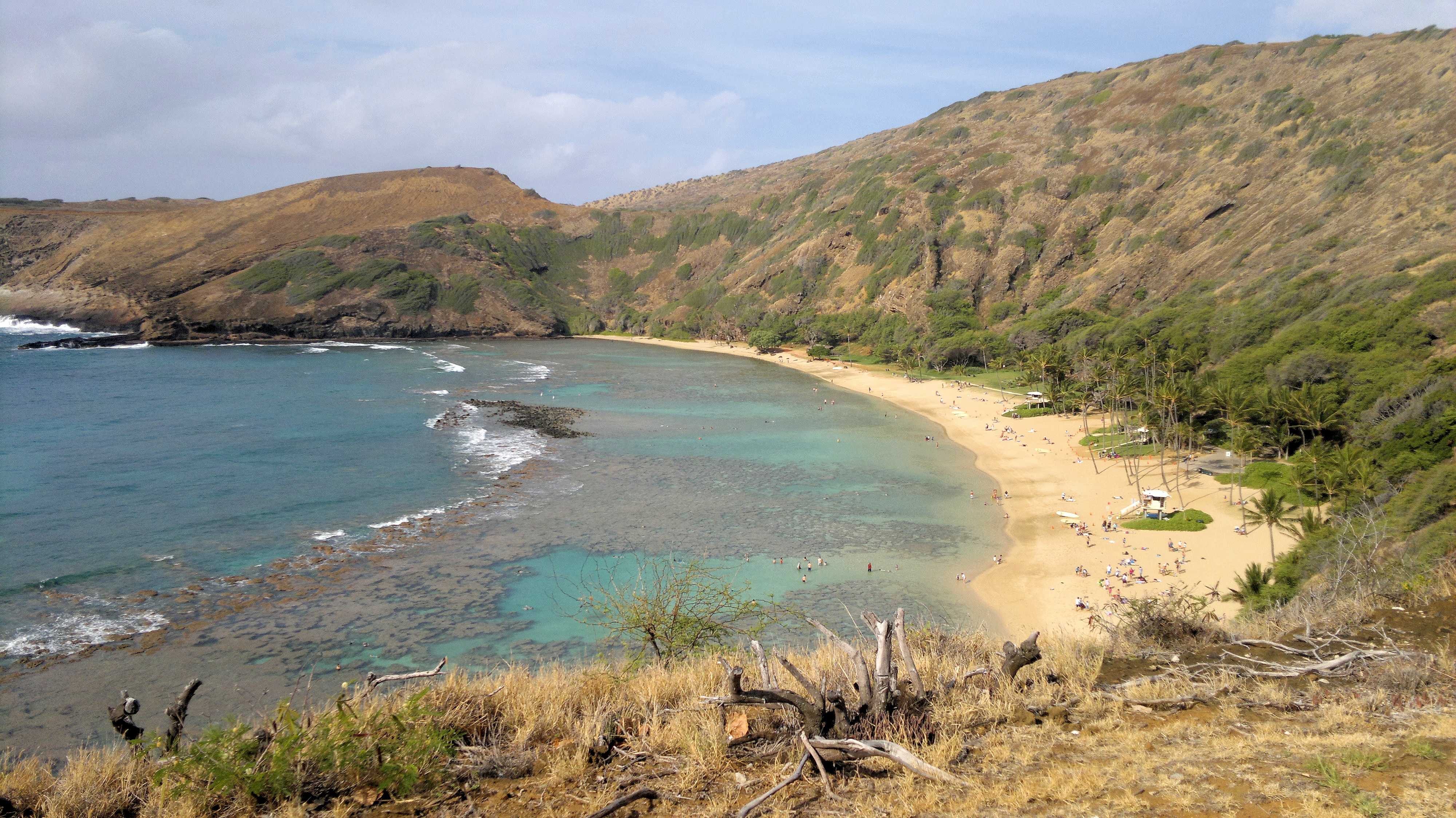 Die zum Schnorcheln beliebte Hanauma Bucht.